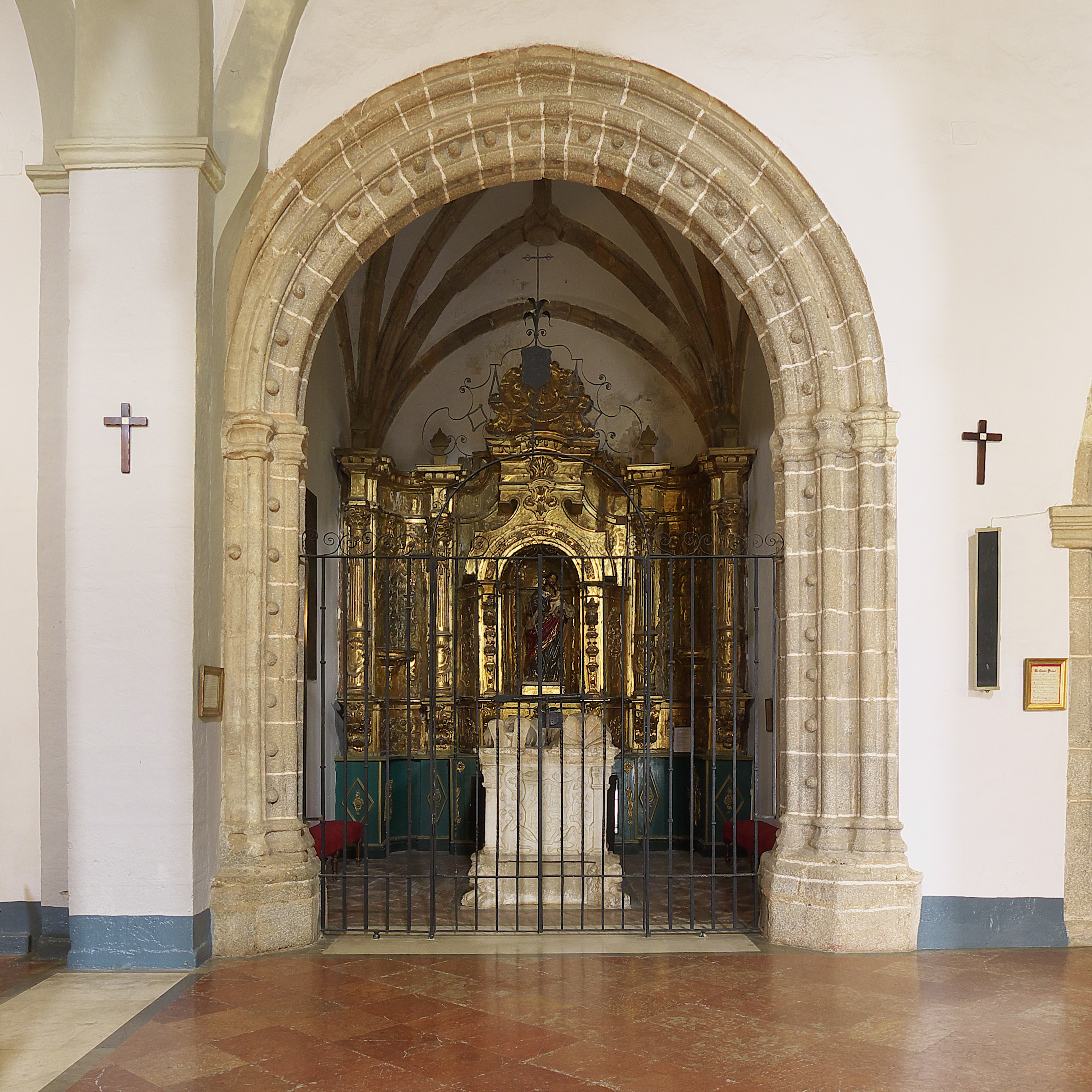 En esta capilla se encuentra el sepulcro del Comendador de Piedrahita y Caballero de Alcántara, Vasco de Jerez y su esposa Beatriz Bravo González (1535).